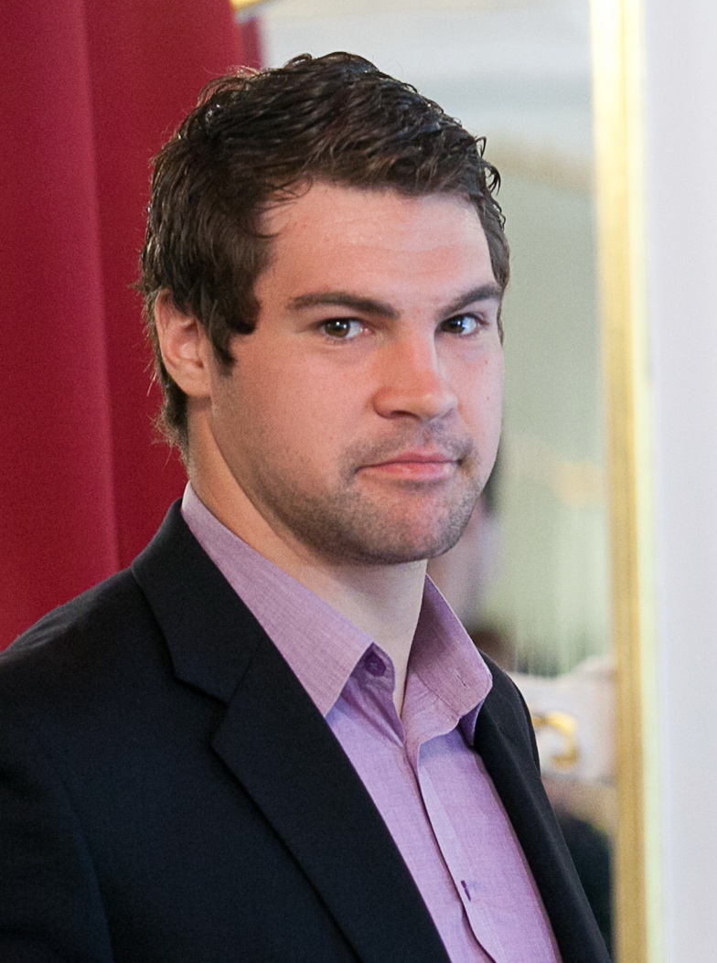 Kaspars Daugaviņš